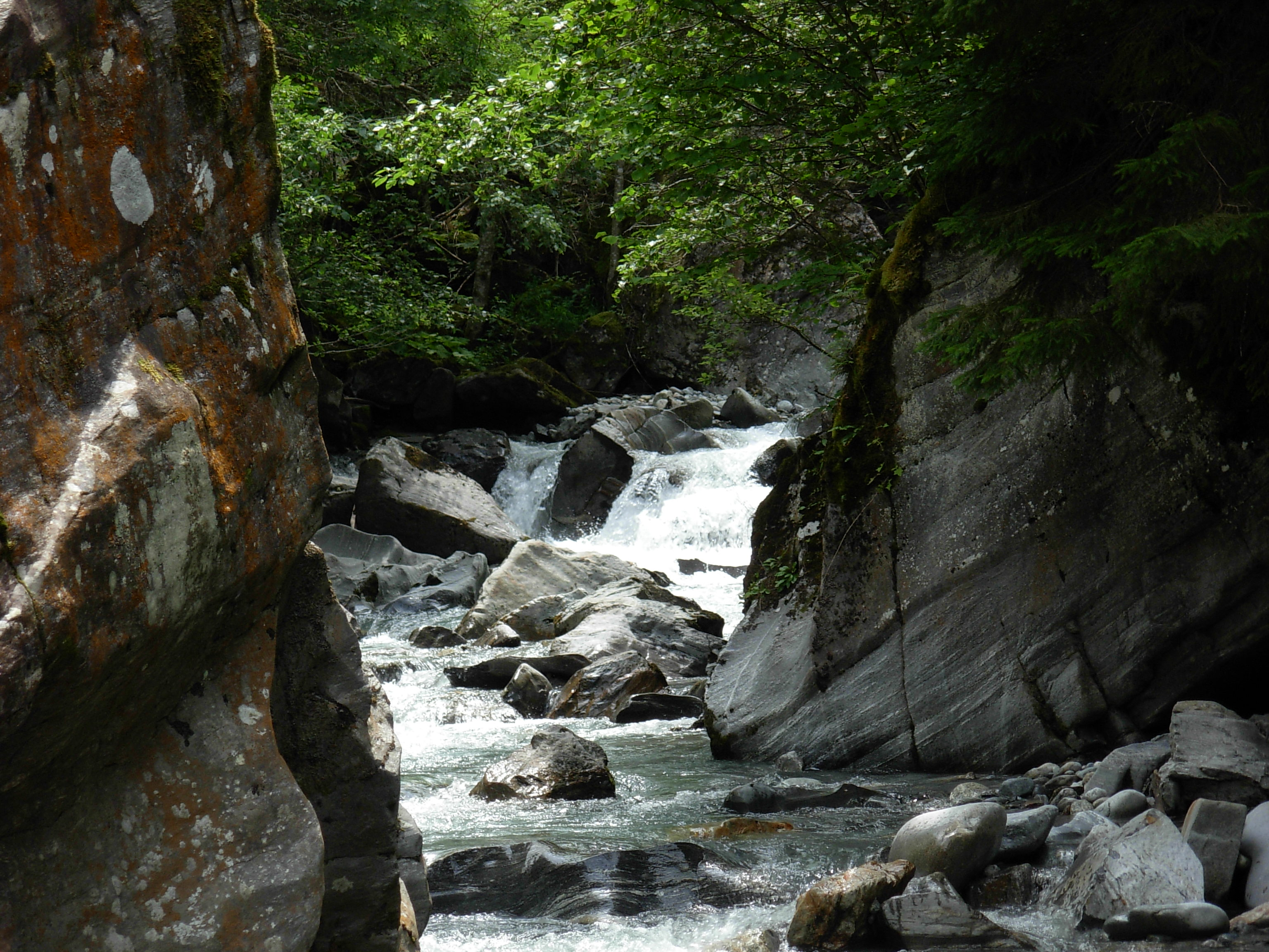 En remontant la rivière Trient jusqu'aux Marécottes. Juillet 2007.